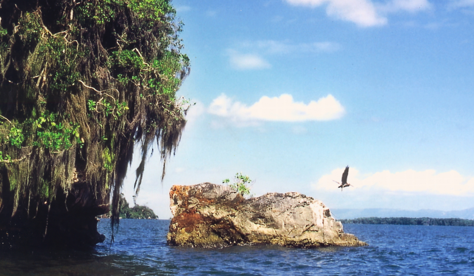 Nationalpark Los Haitises, Dominikanische Republik: So genannte "Cayos", kleine Inseln, weg fliegender Pelikan